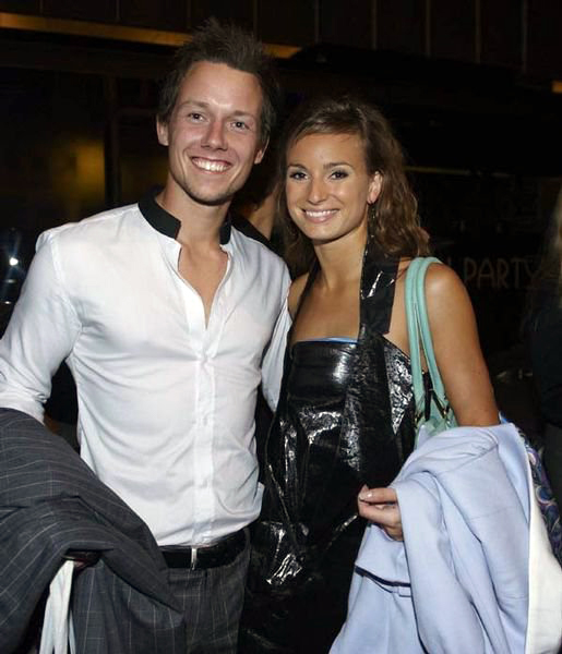 Claudia Rex danner privat par med kæresten Martin Coops. Billedet er taget af Uffe Kongsted, MSN Starlounge.